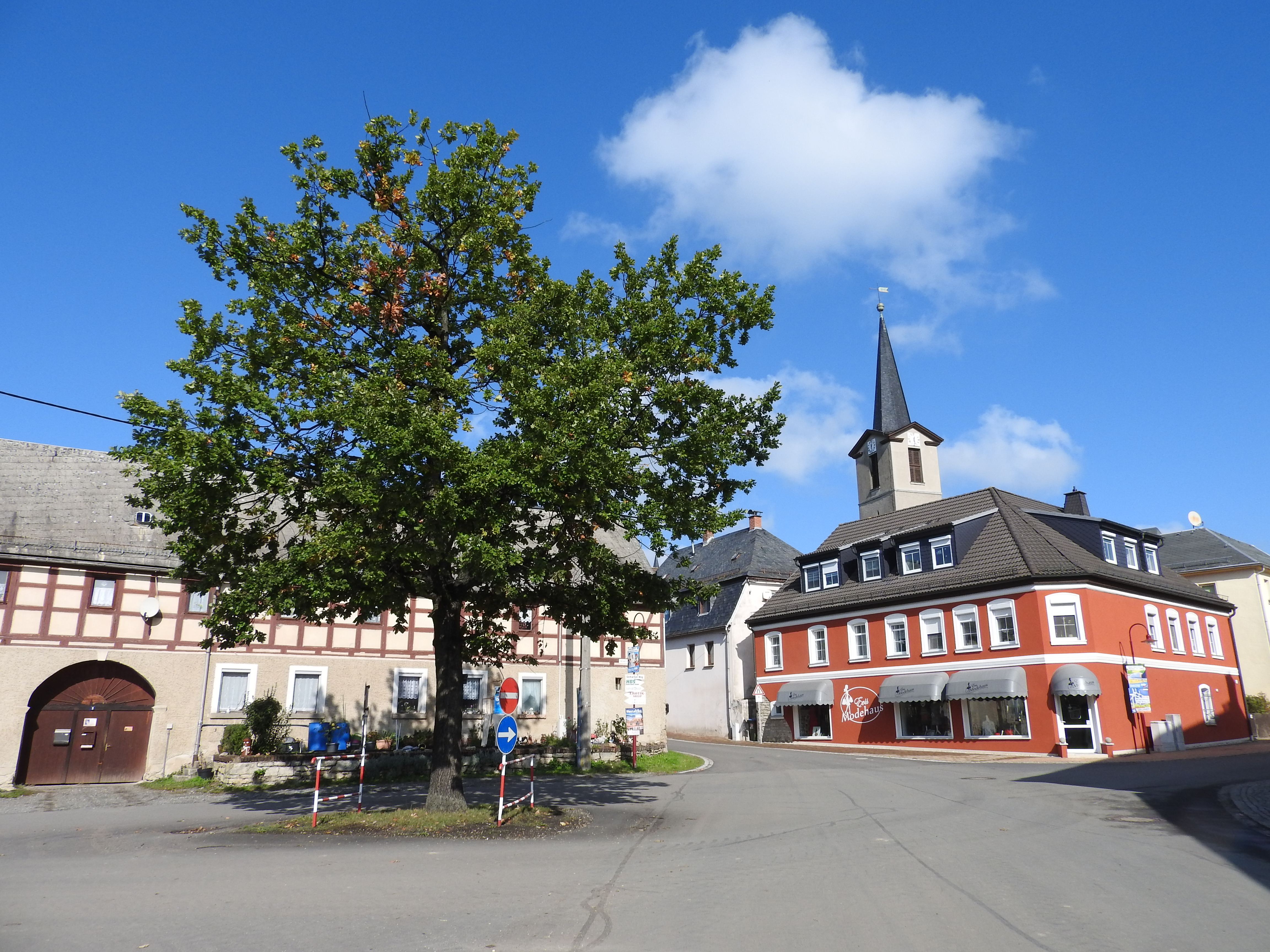 Oettersdorf, Thüringen